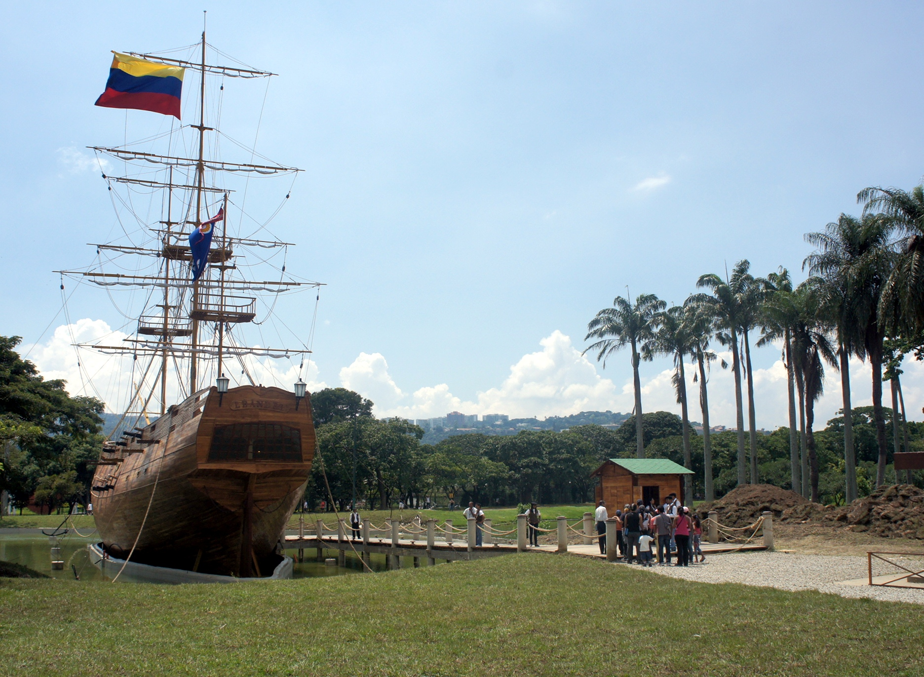 Réplica del Leander, buque venezolano